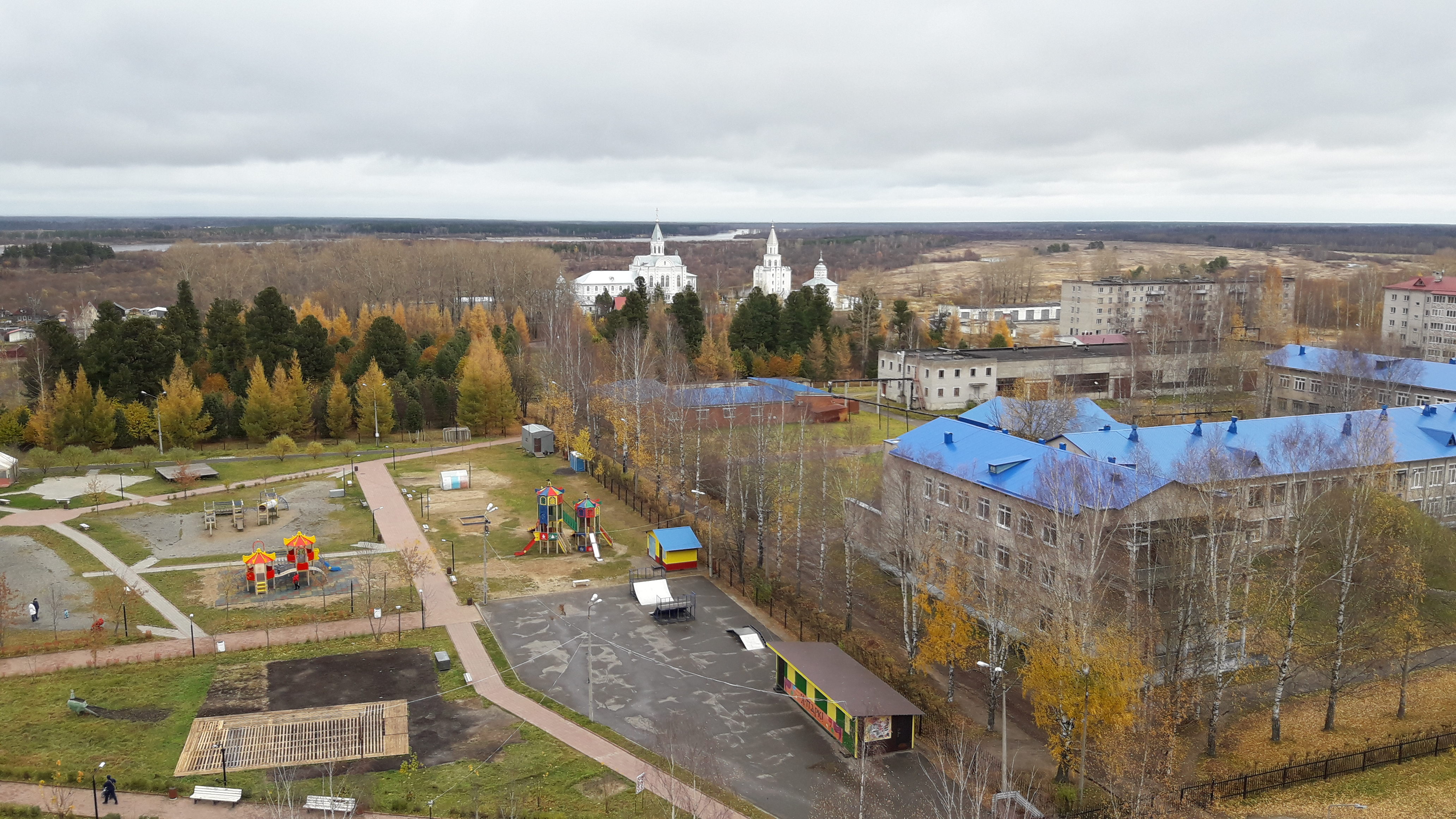 Панорама Коряжмы